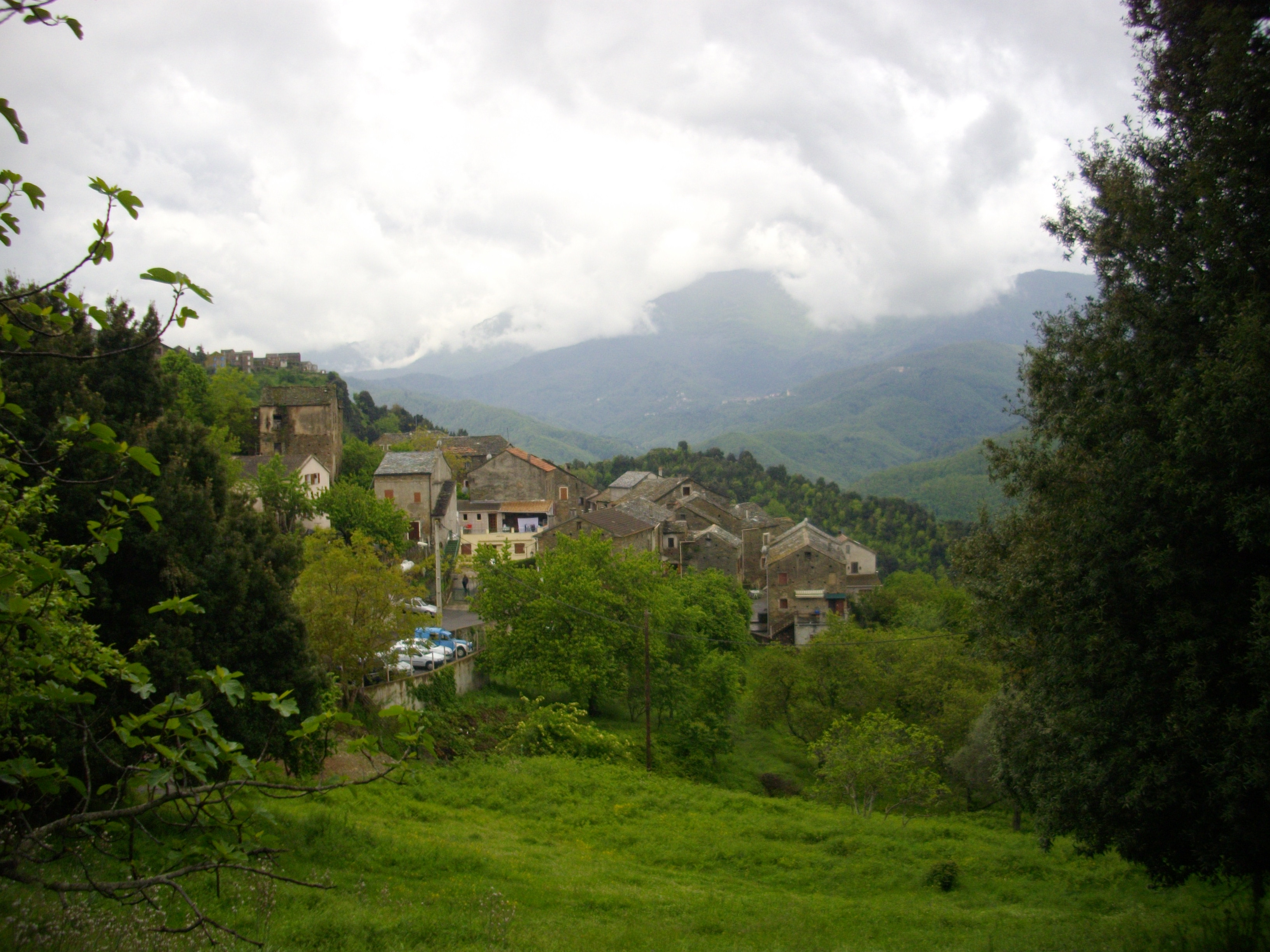 Scata (Corse) Vue sur le village depuis l'église